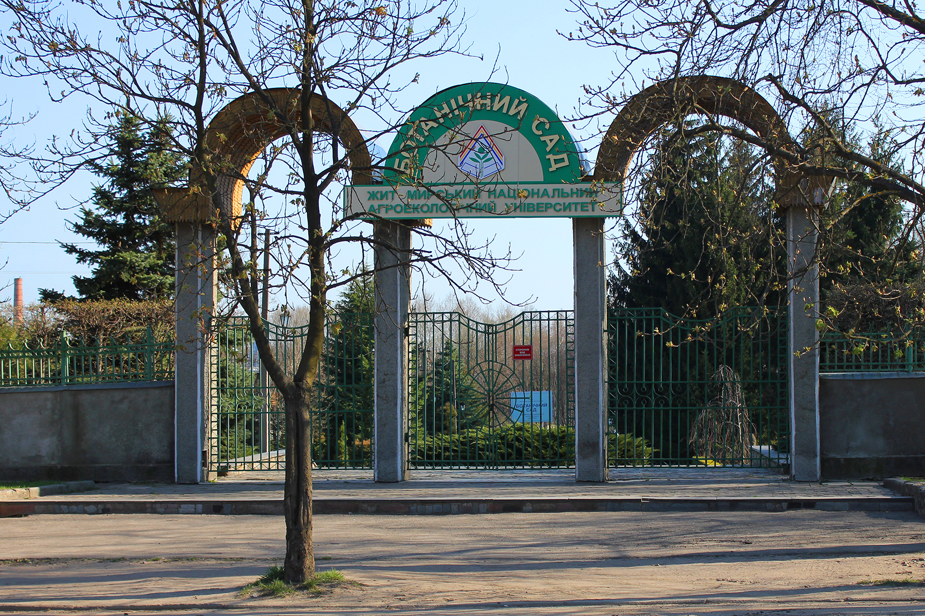 Ботанічний сад Житомирського національного агроекологічного університету